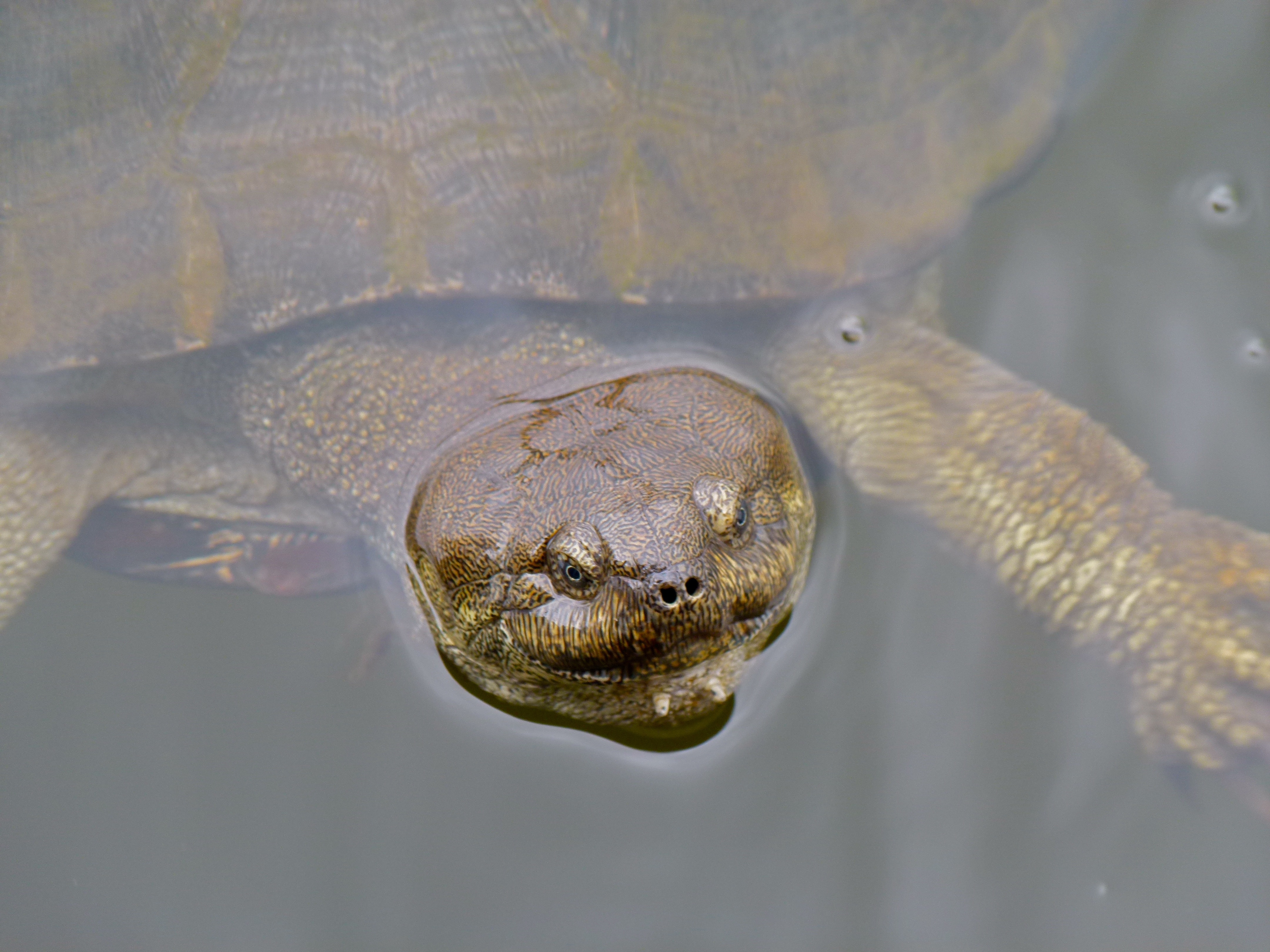 Mankwe Bird Hide, Pilanesberg, SOUTH AFRICA